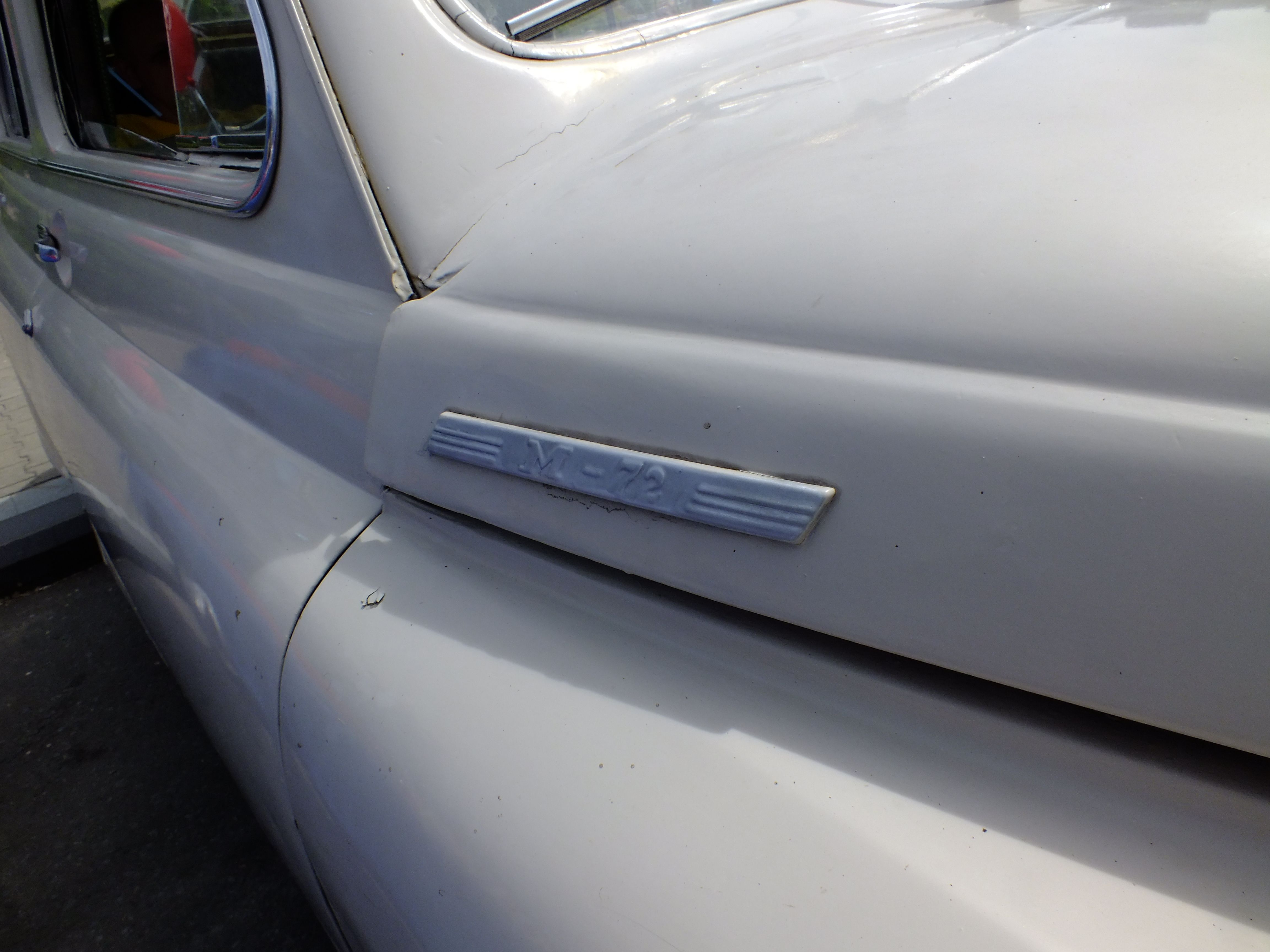 GAZ-M-72